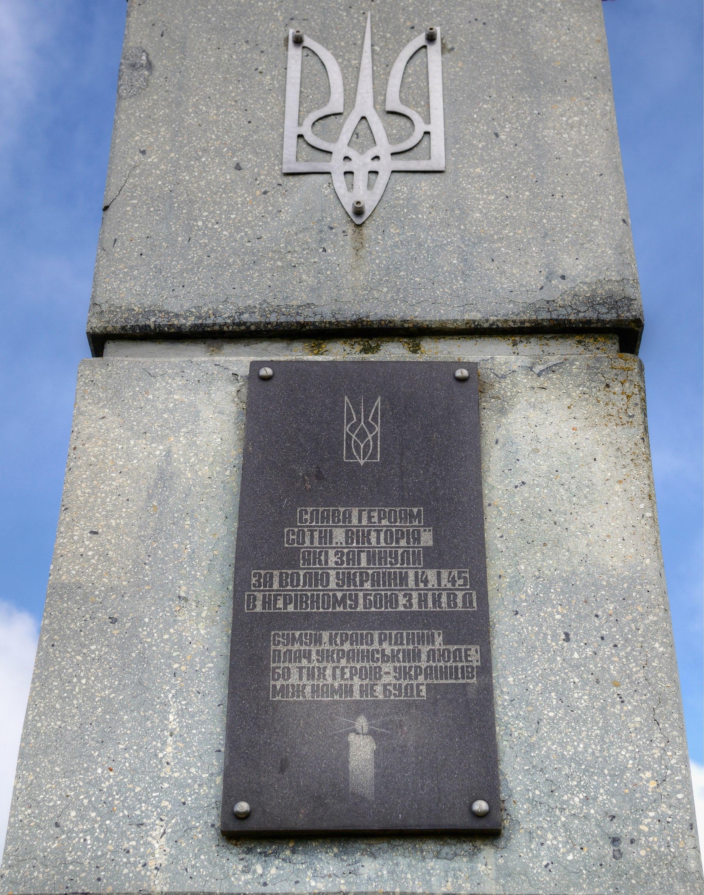 Таблиця на хресті в Корцівці